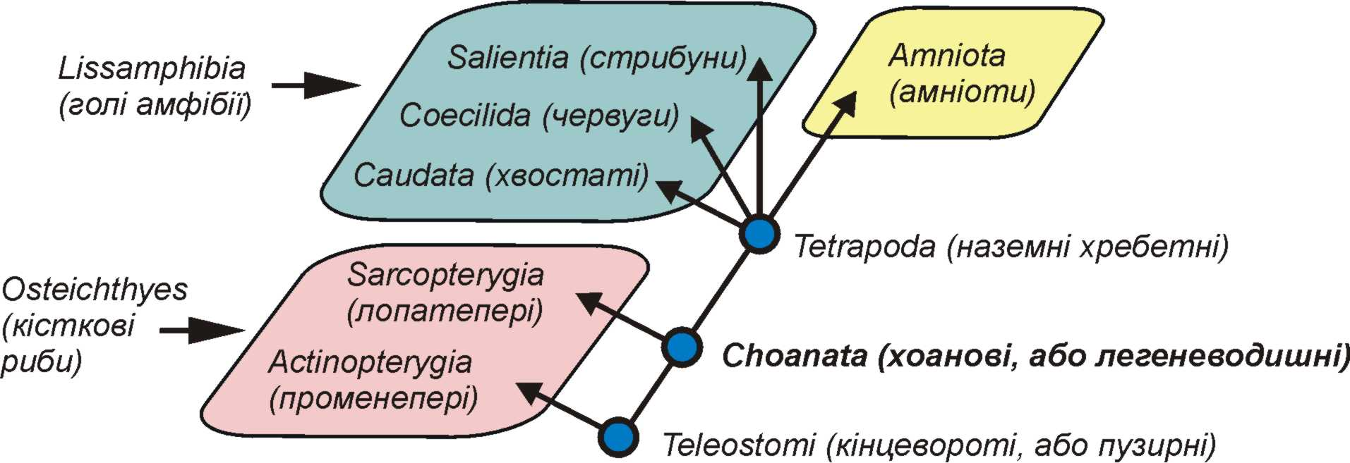 схема філогенетичних стосунків лопатеперих (Sarcopterygii). оригінальний рисунок